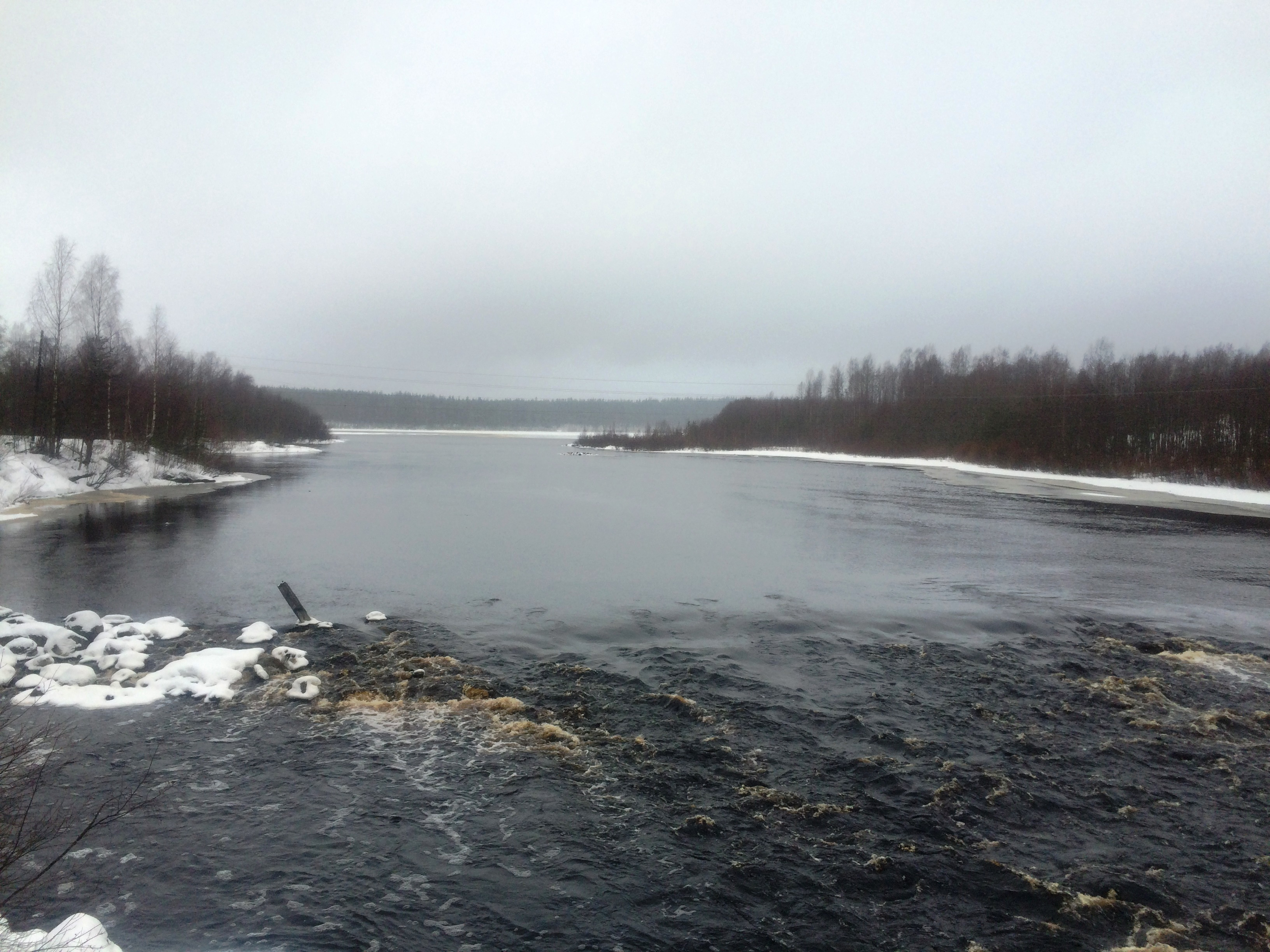 Каратйоки